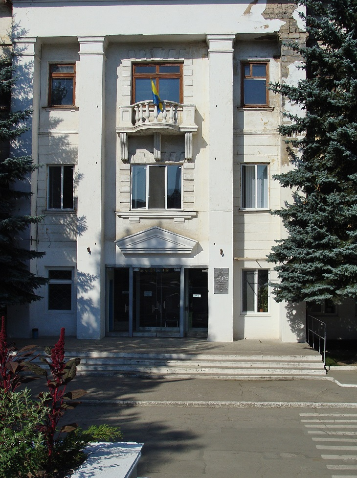 центральный вход в офис ГП ЗуЭТЭС.